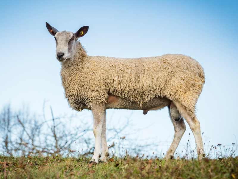 Craig vr Orsedd Bluefaced Leicester Ram * 10.03.2014